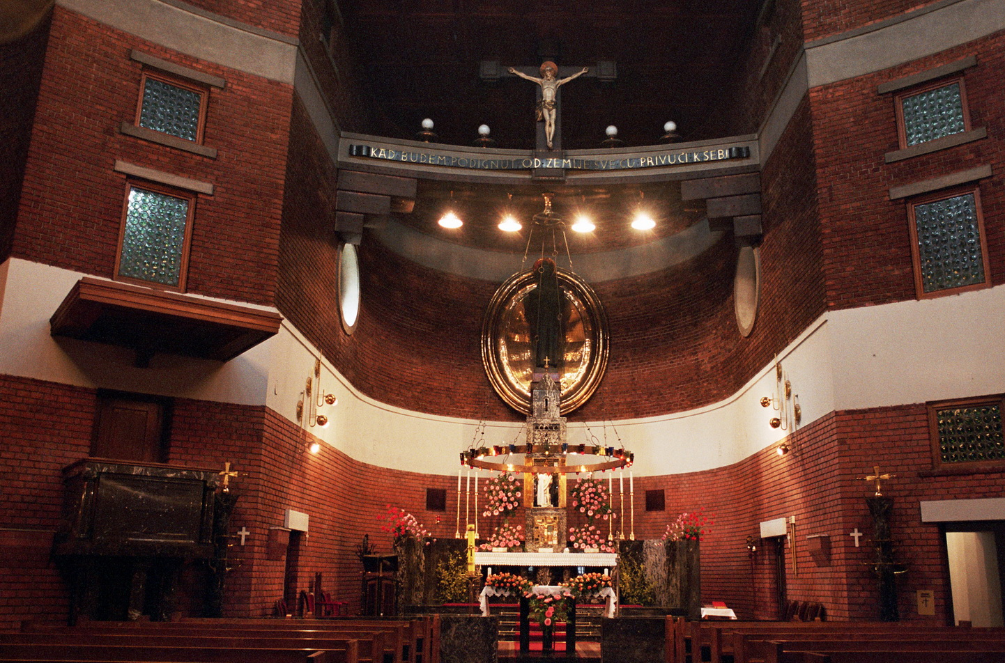 Спољашњост цркве